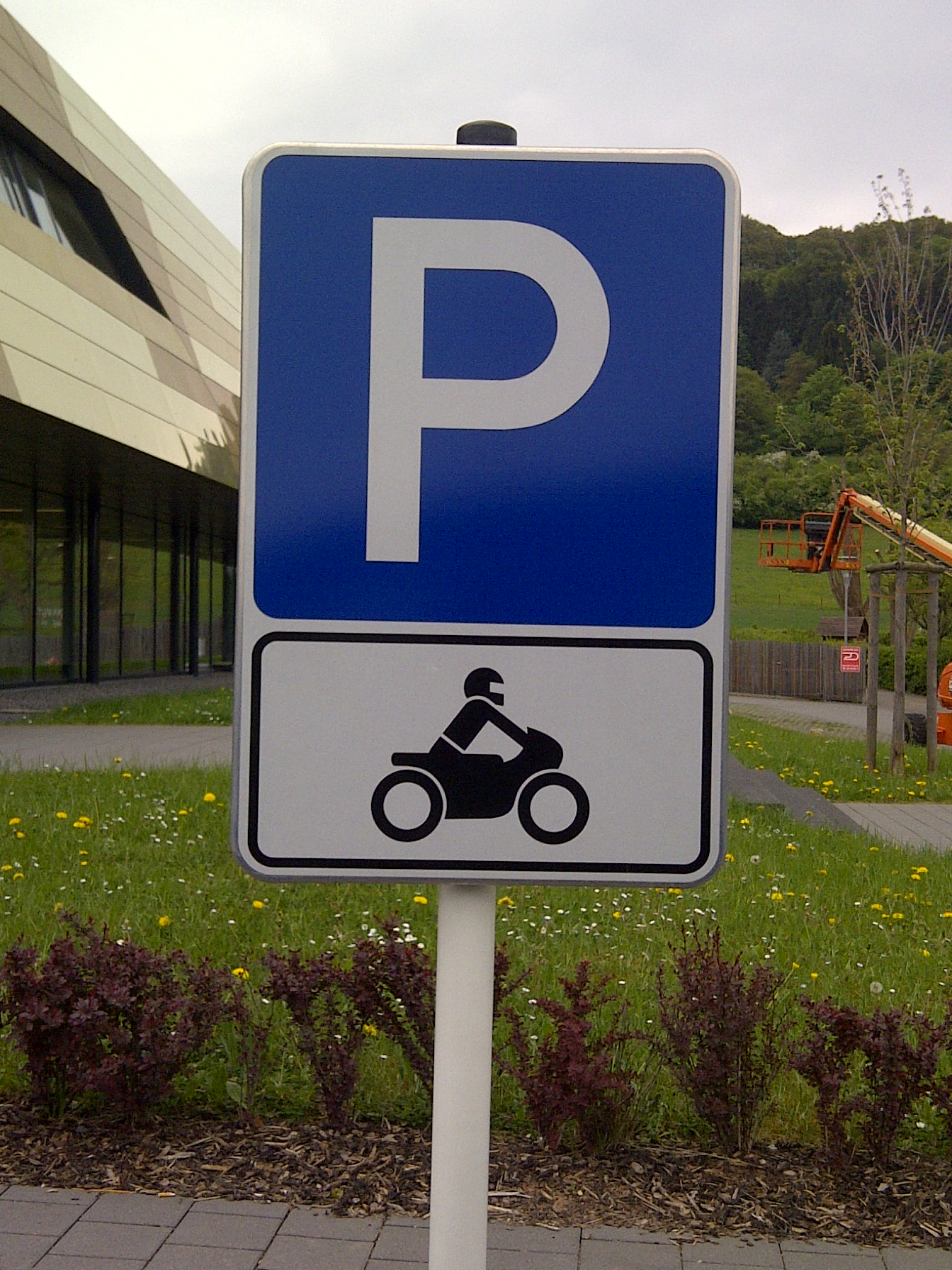 Verkéiersschëld E,23 "Parking" mam Zousazschëld Modell 1 "Motorieder" aus dem lëtzebuerger Code de la Route